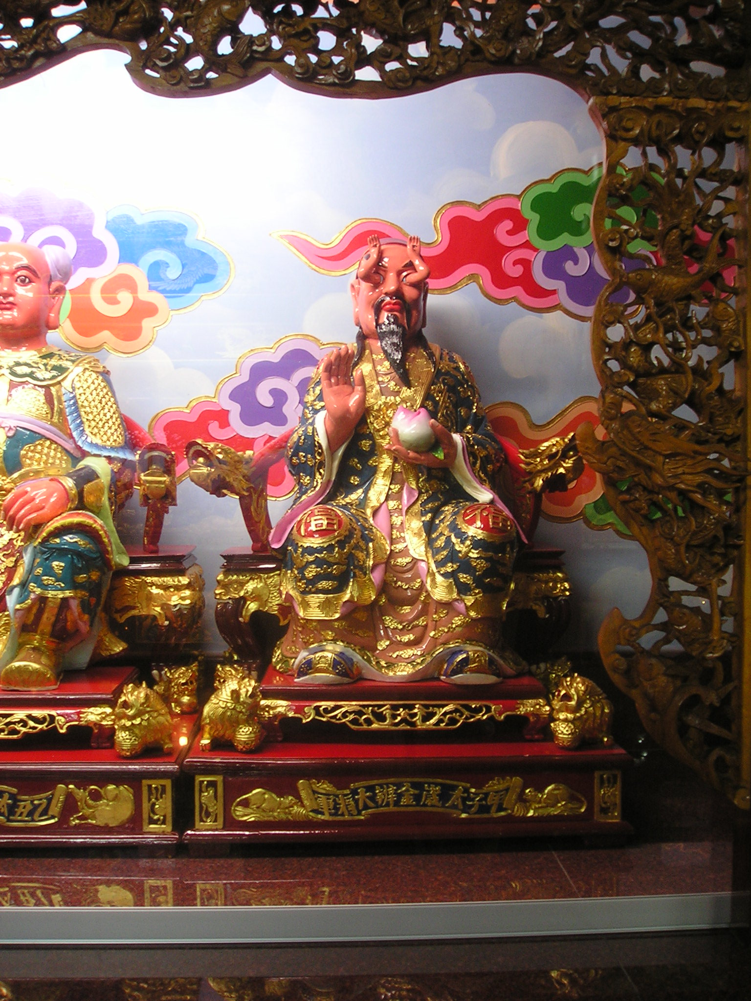 a tai sui general